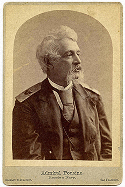 Пузино Орест Поликарпович